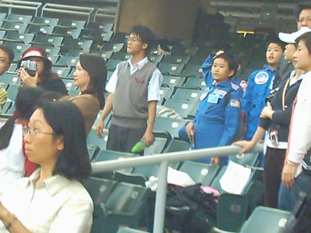 由本人於zh:2005年zh:11月27日拍攝。